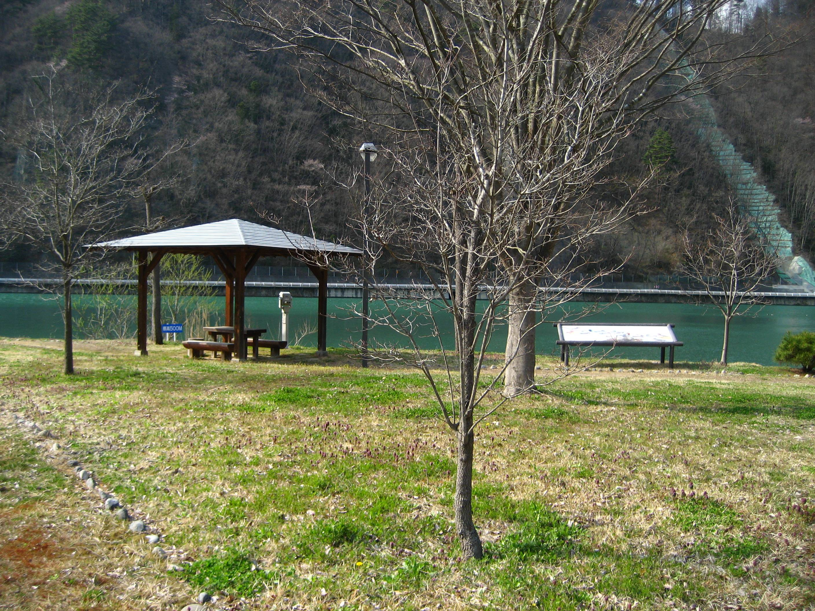 Mizutori park in Ikusaka village, Nagano prefecture, Japan (生坂水鳥公園).